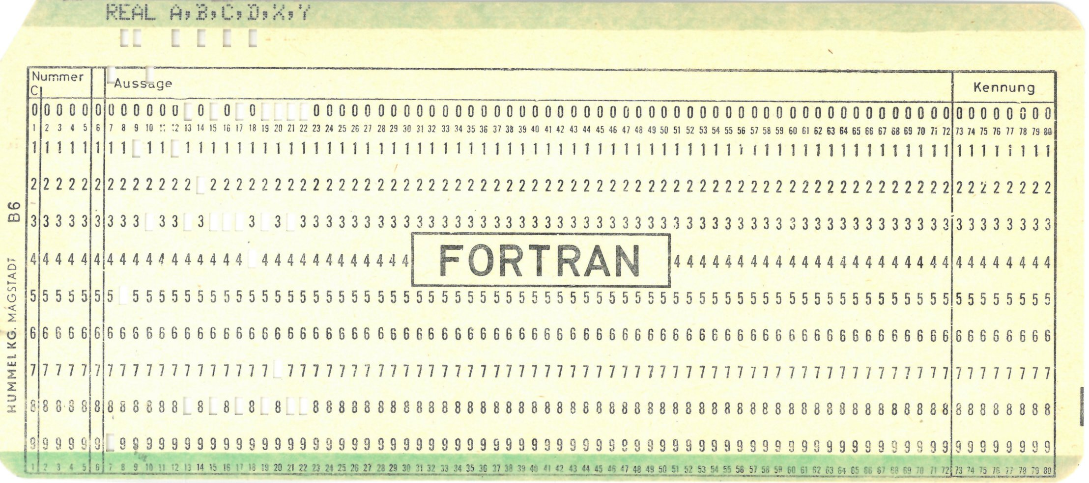 Lochkarte im 80-Spalten-Format nach dem IBM-Standard. Bedruckt zur Verwendung für eine Zeile eines FORTRAN-Quellcodes (im Beispiel genutzt als Deklaration von sechs Float-Variablen) Spalte 1: Kennung für Kommentarzeile, insbesondere mit "C". Spalten 2 bis 5: Zeilennummern (auch Zieladressen für Sprünge) Spalte 6: Kennung für Fortsetzungszeile Spalten 7 bis 72: Programmcode